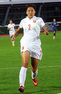 a_70_6821